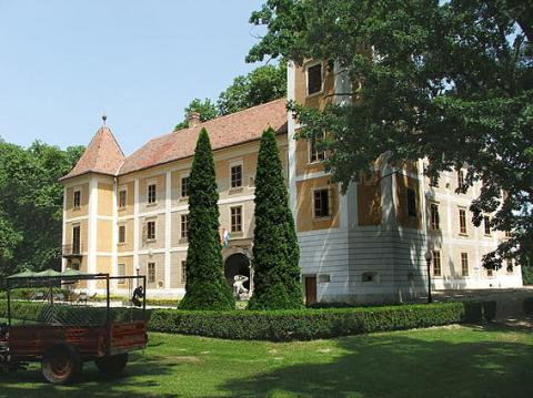 Hédervár, hungary